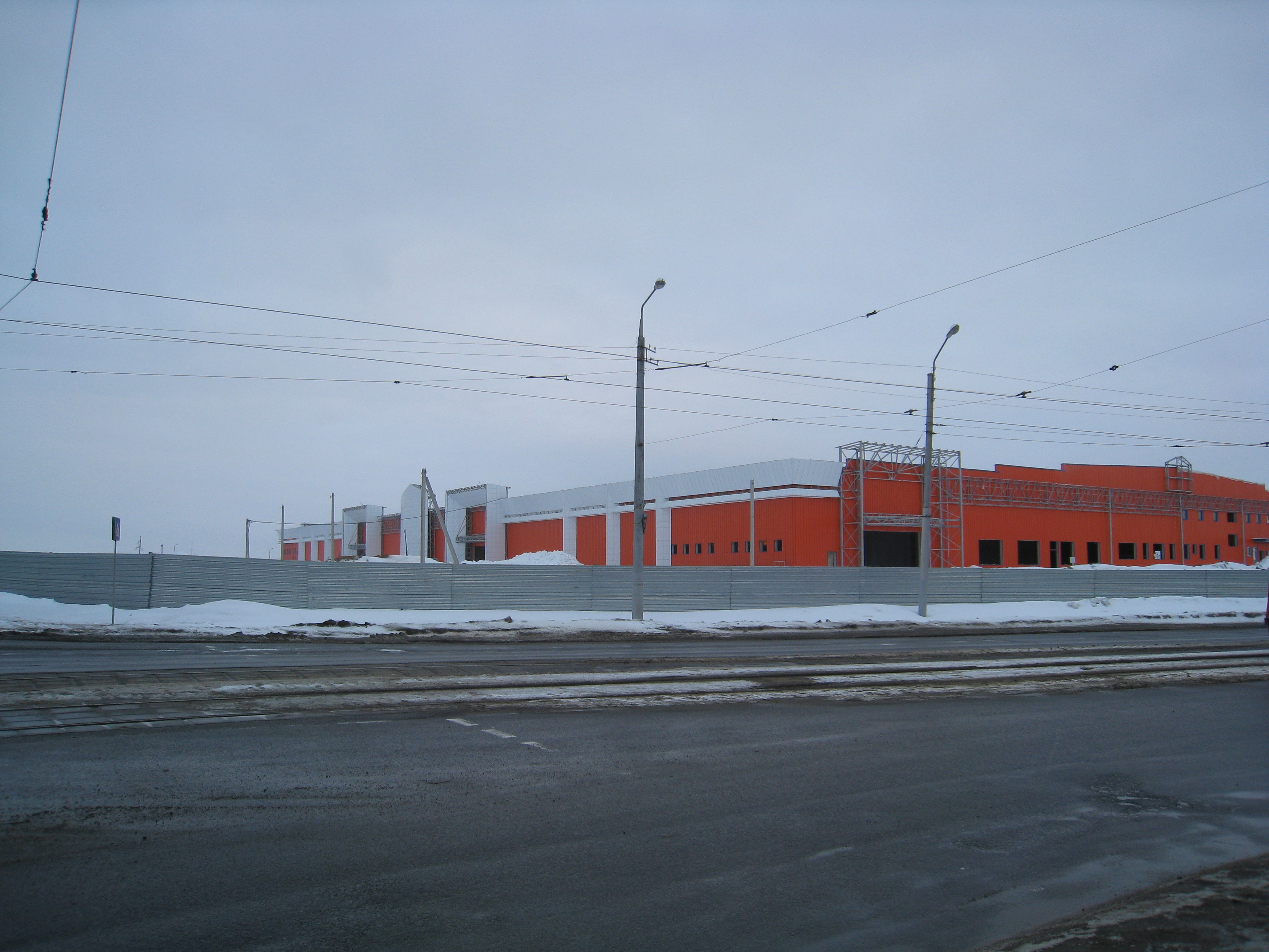 Строительство ТЦ "Корона" в Витебске.